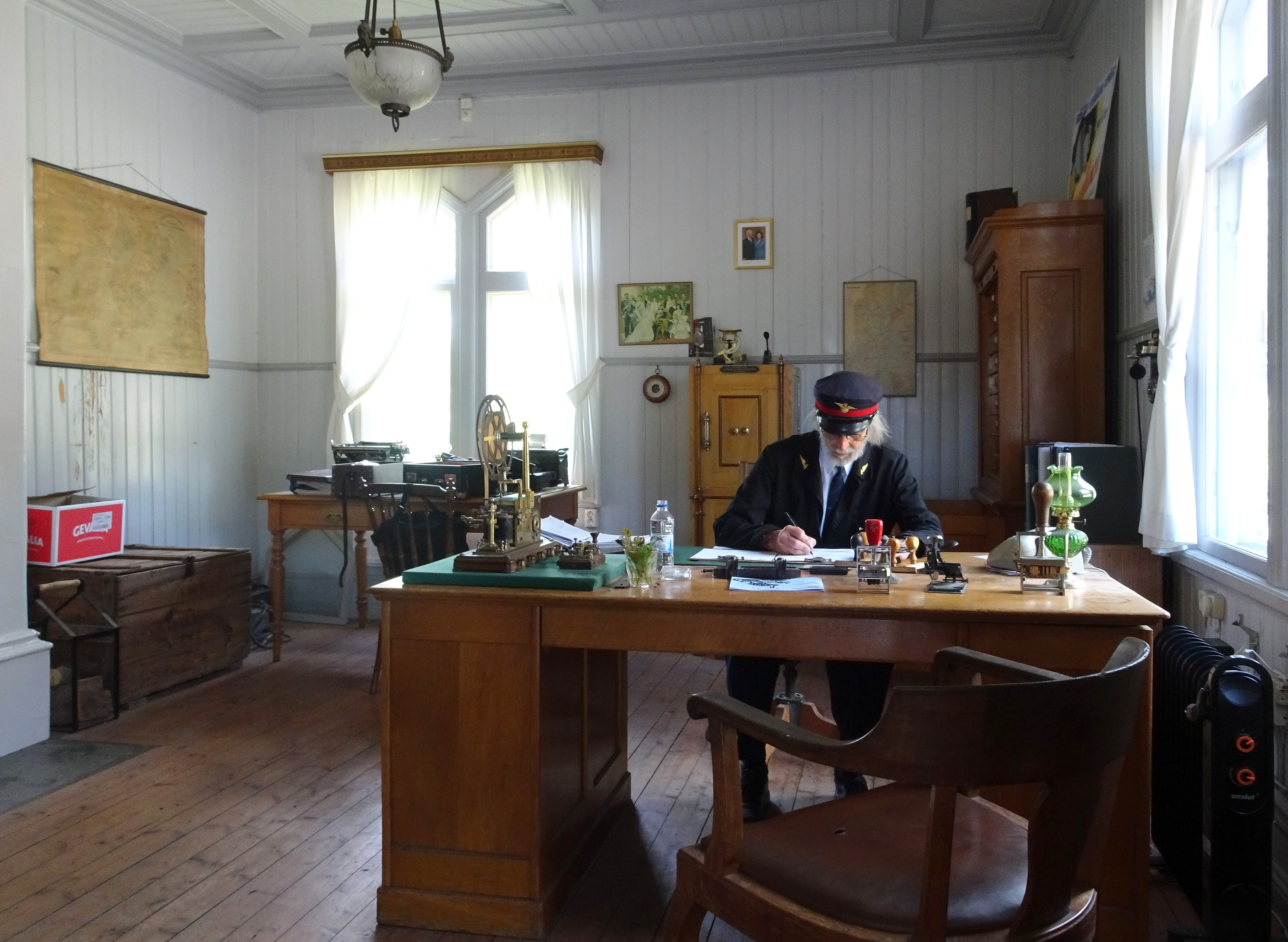 Läggesta Nedre stationshus, interiör